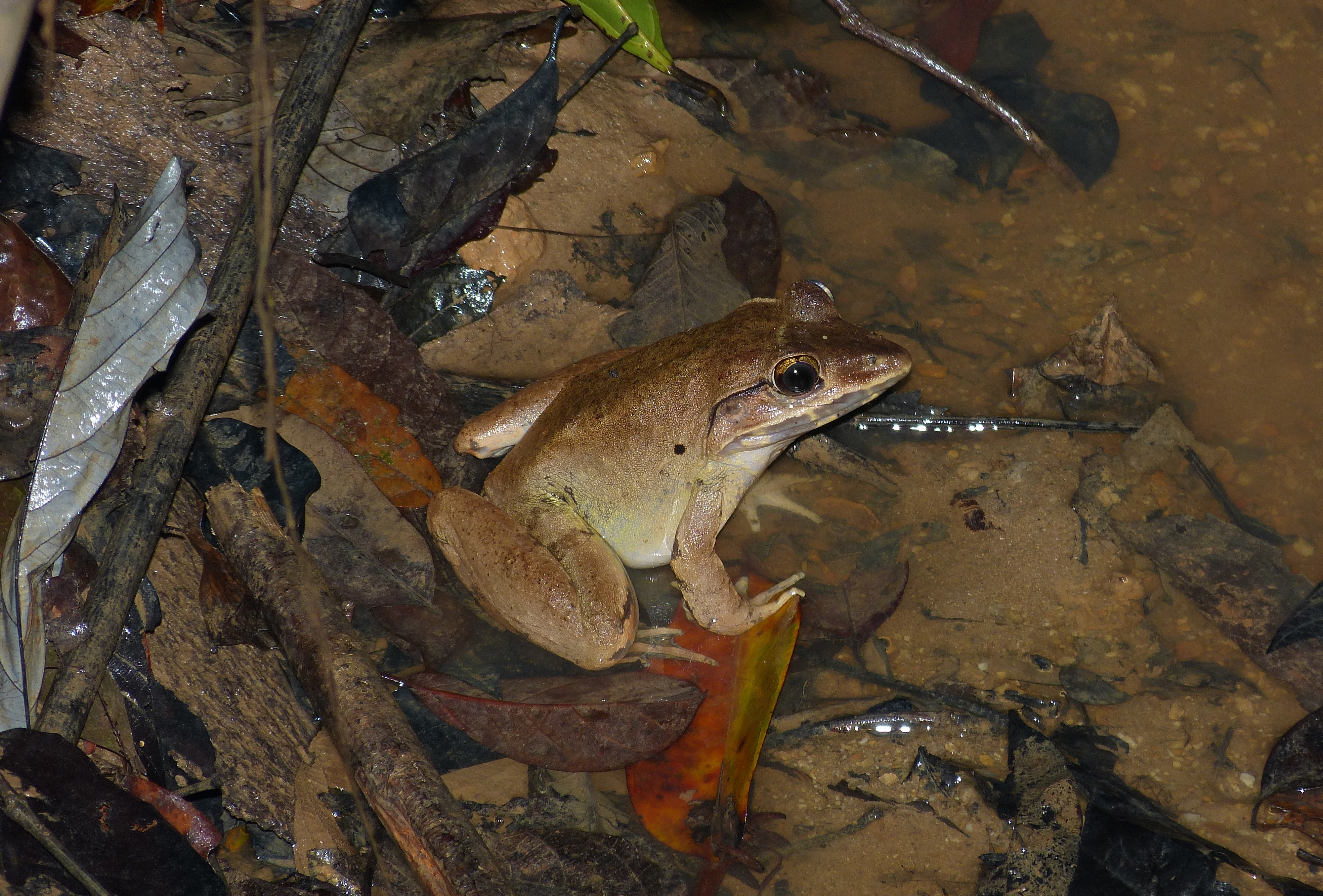 Taman Negara NP, Pahang, MALAYSIA